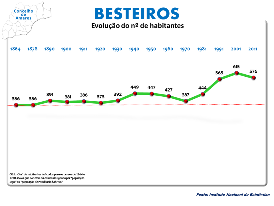 Censo 2011